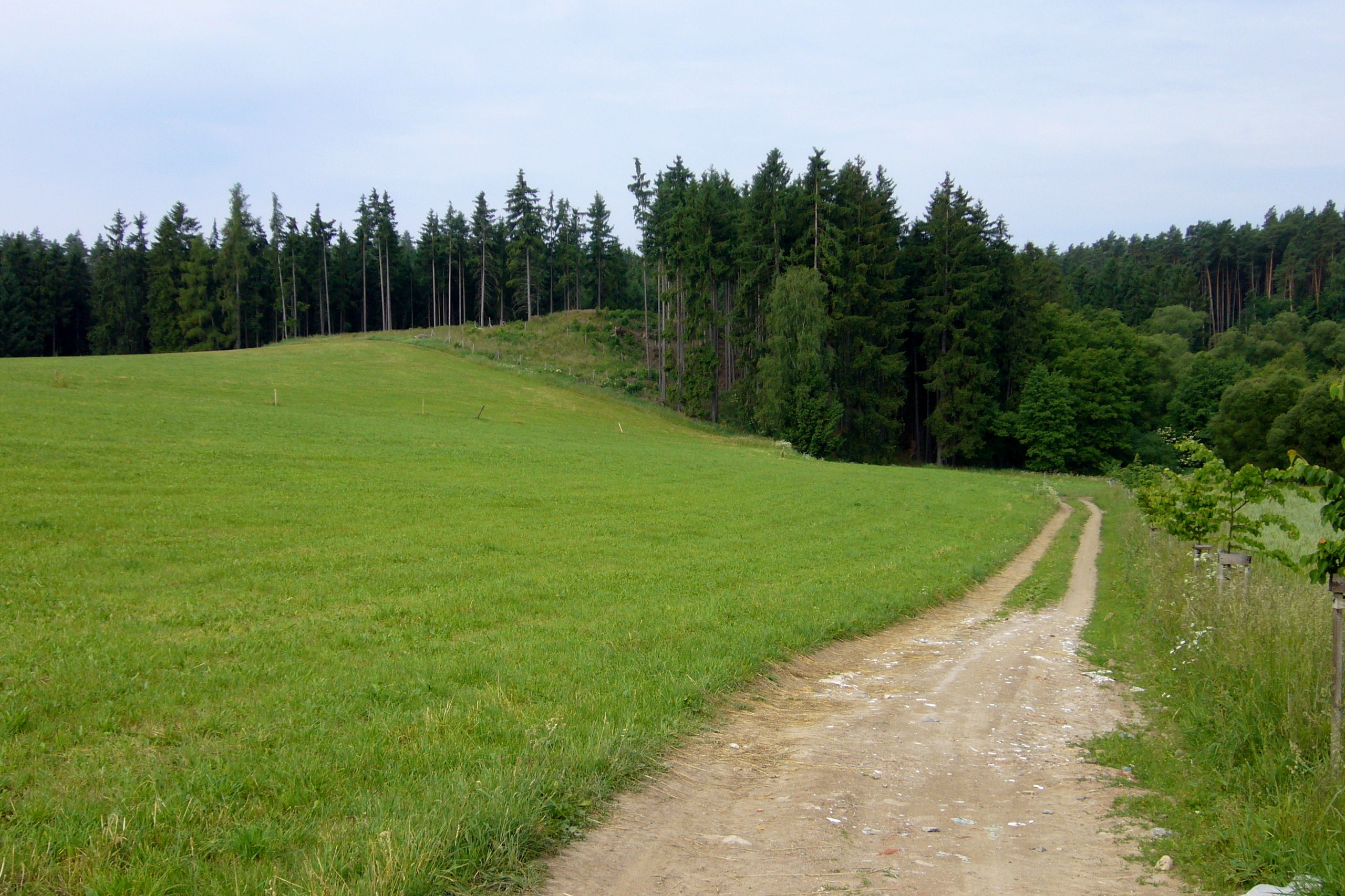 Celkový pohled na návrší se pozůstatky hradu